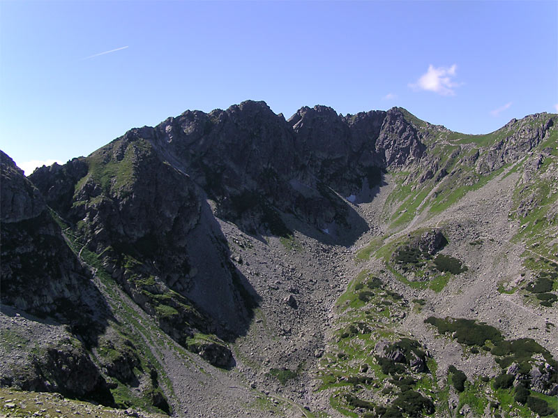 Wrota Chałubińskiego i Szpiglasowa Przełęcz wyrastające nad Dolinką za Mnichem widziane z wierzchołka Mnicha. Jestem autorem zdjęcia - Andrzej Makarczuk.